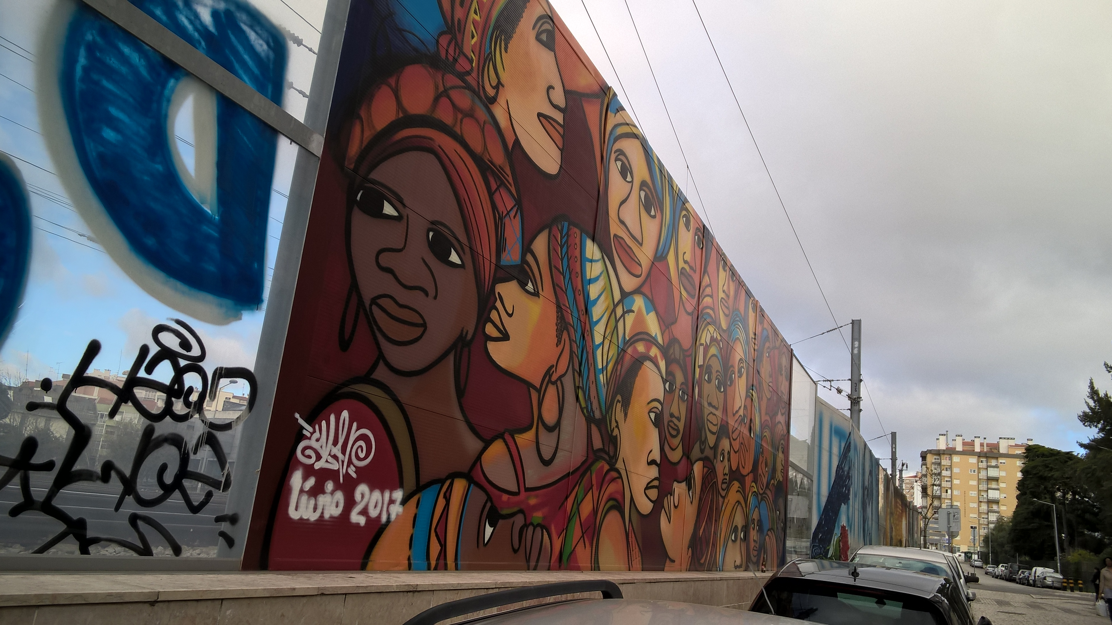 Grafitti Rua Afonso de Albuquerque